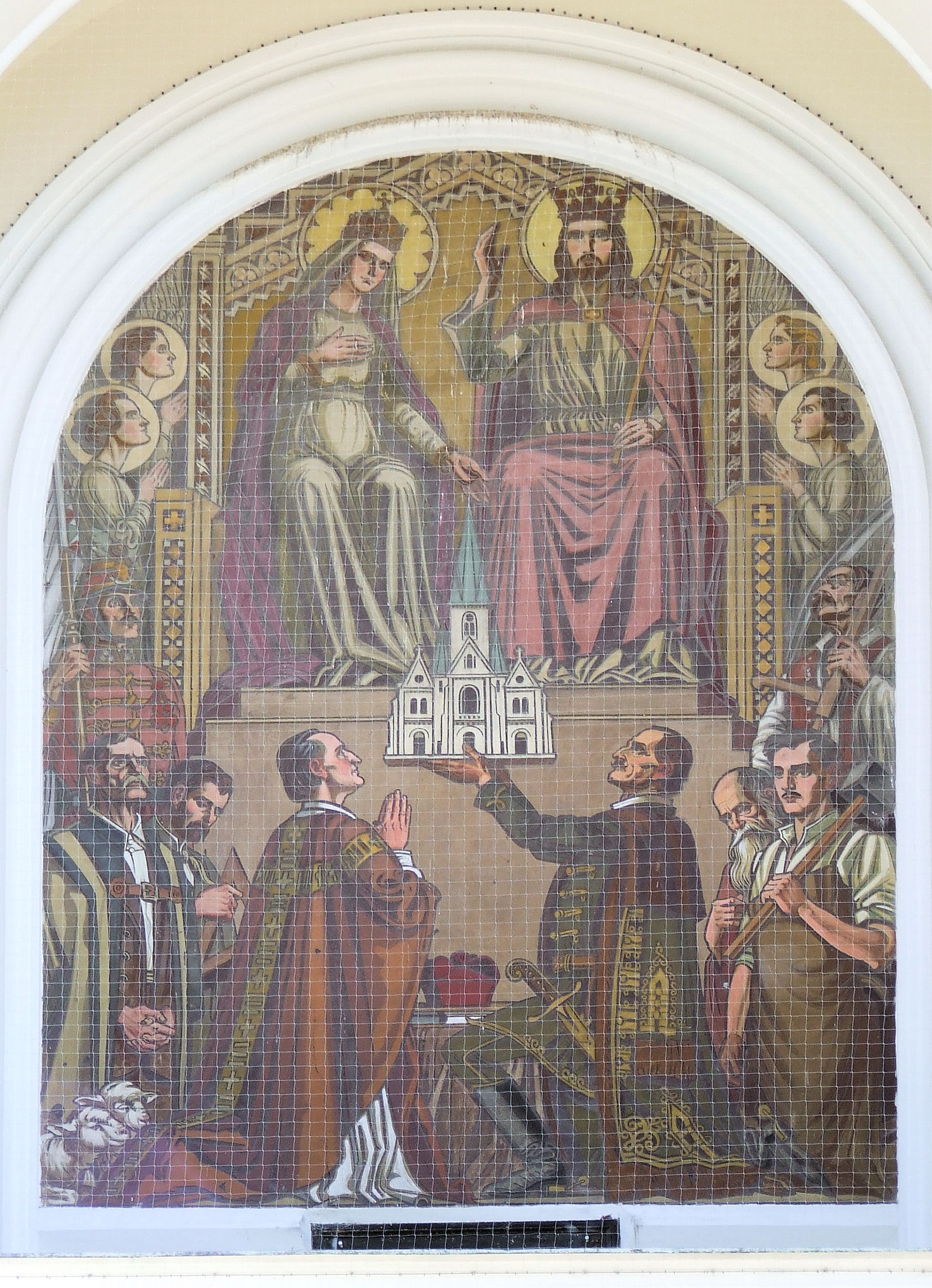 Leszkovszky György (1891–1968) A templom felajánlása című freskója a kaposvári székesegyház homlokzatán (1937)